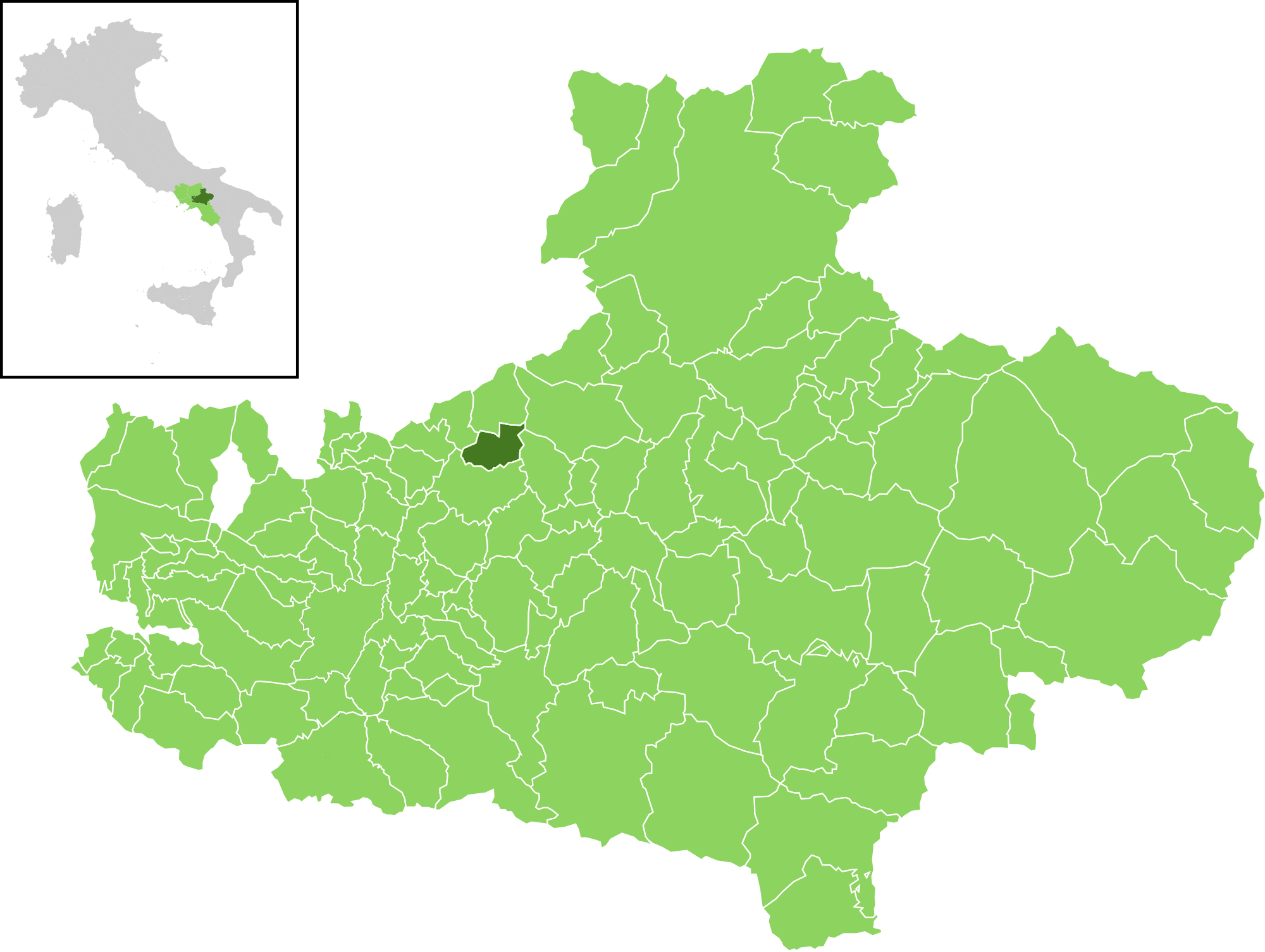 Posizione del comune all'interno della provincia di Avellino